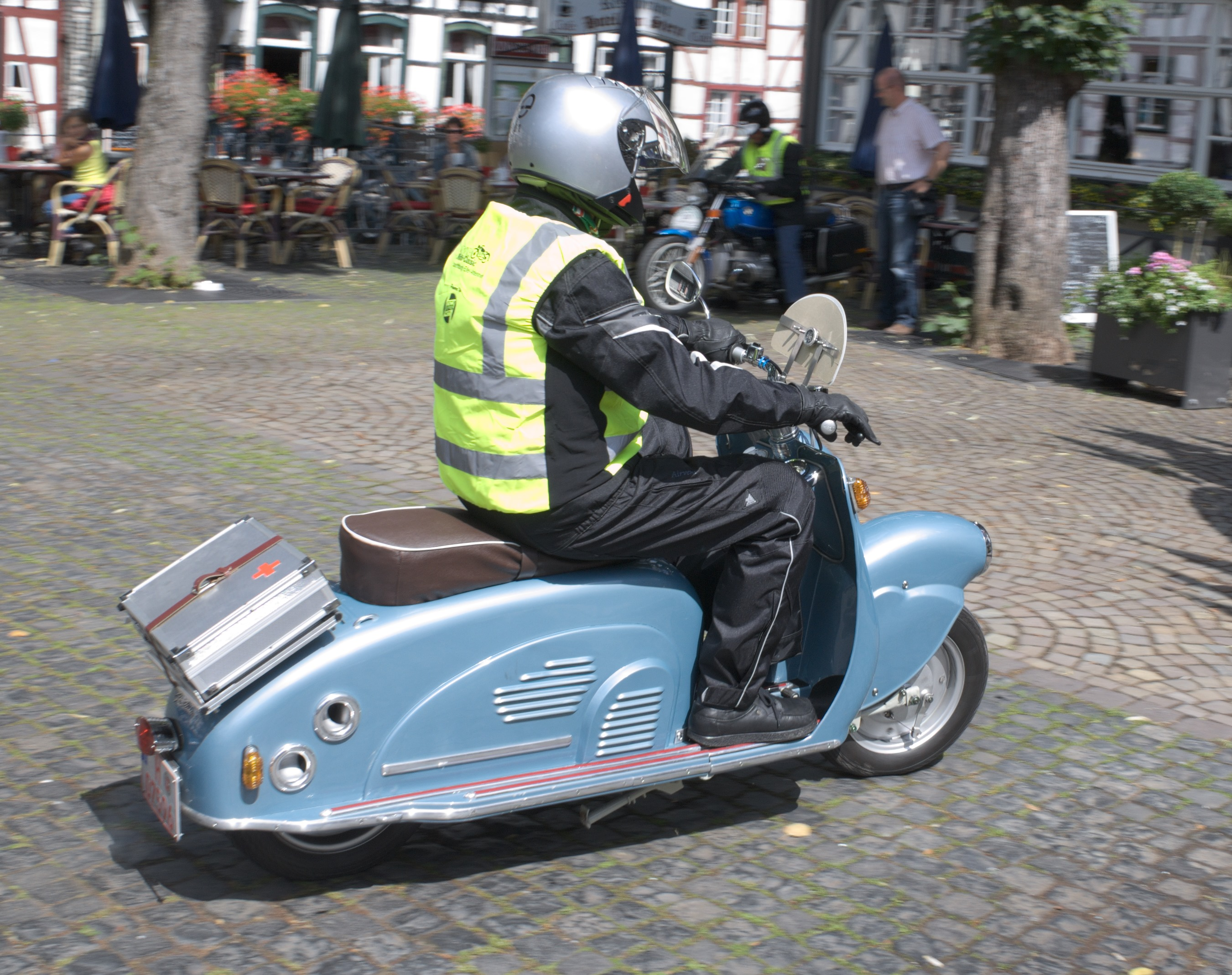 Historischer Roller der Traktorenfabrik Röhr